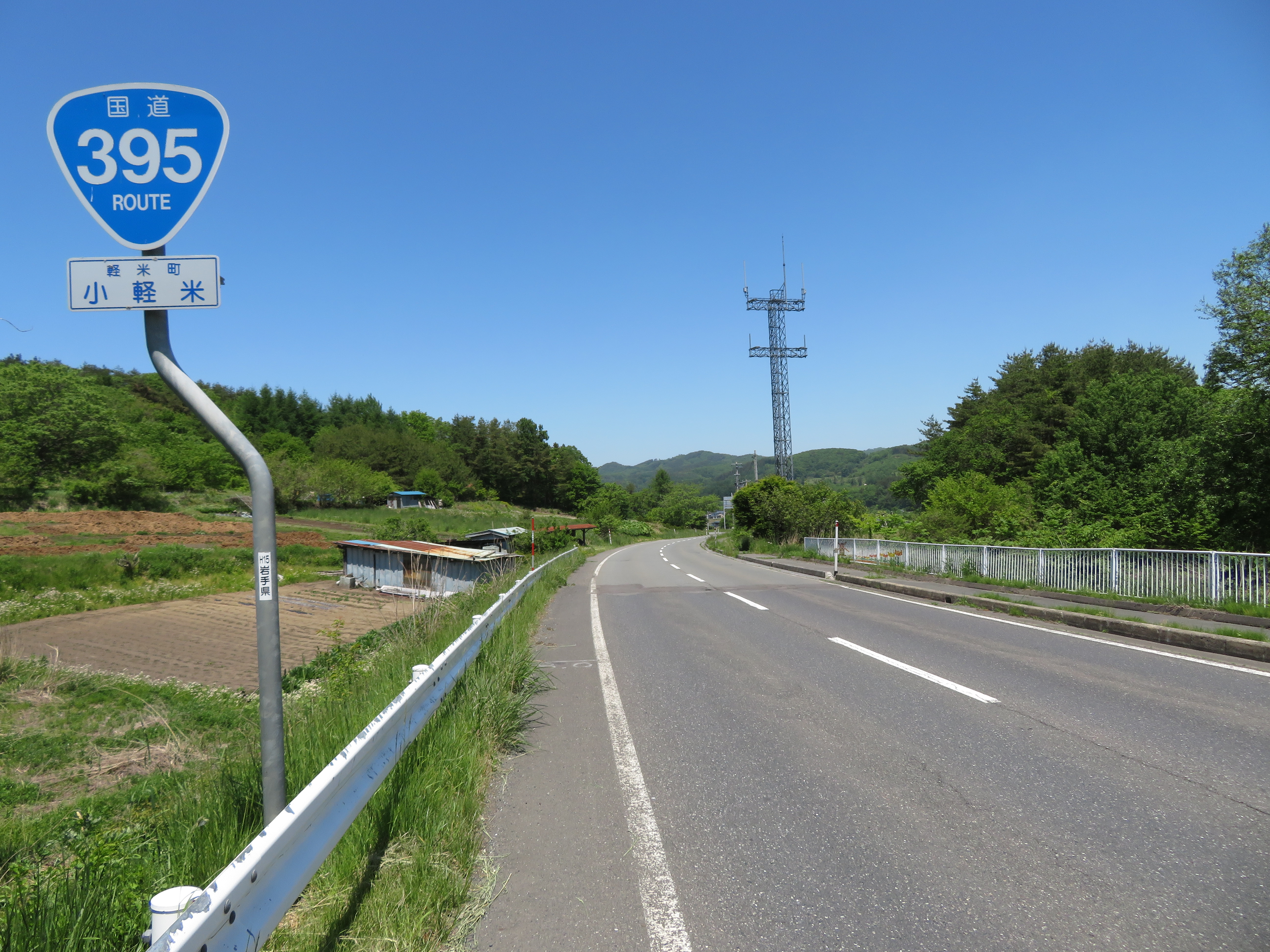 国道395号小軽米バイパス（岩手県九戸郡軽米町小軽米第2地割付近（軽米方面を撮影） Canon PowerShot SX720 HS